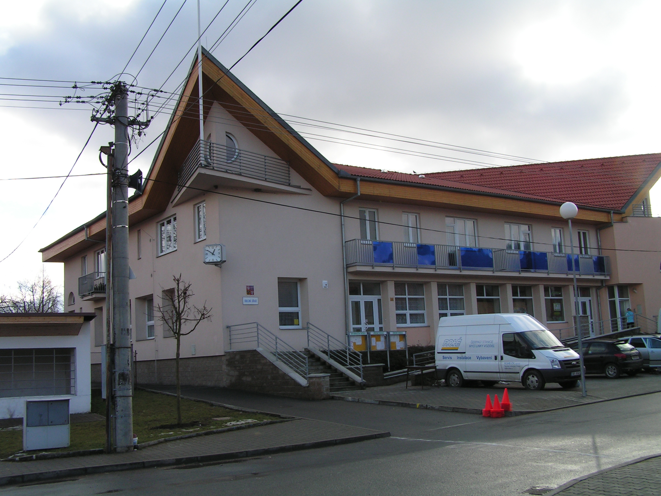 Radostice - obecní úřad